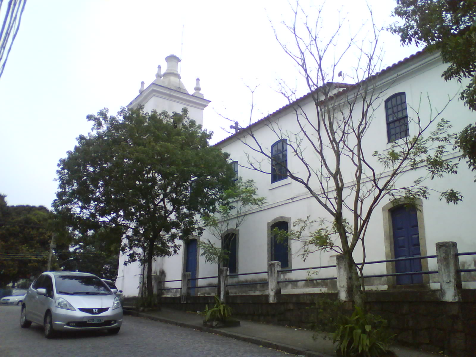 Foto de um dos pontos turísticos do bairro. Igreja Nossa Senhora da Pena - site do governo, link